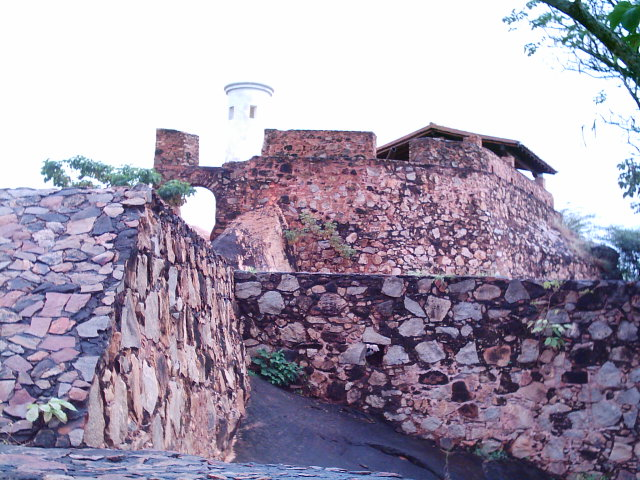 Fortin El Zamuro castle in Ciudad Bolívar, Venezuela.